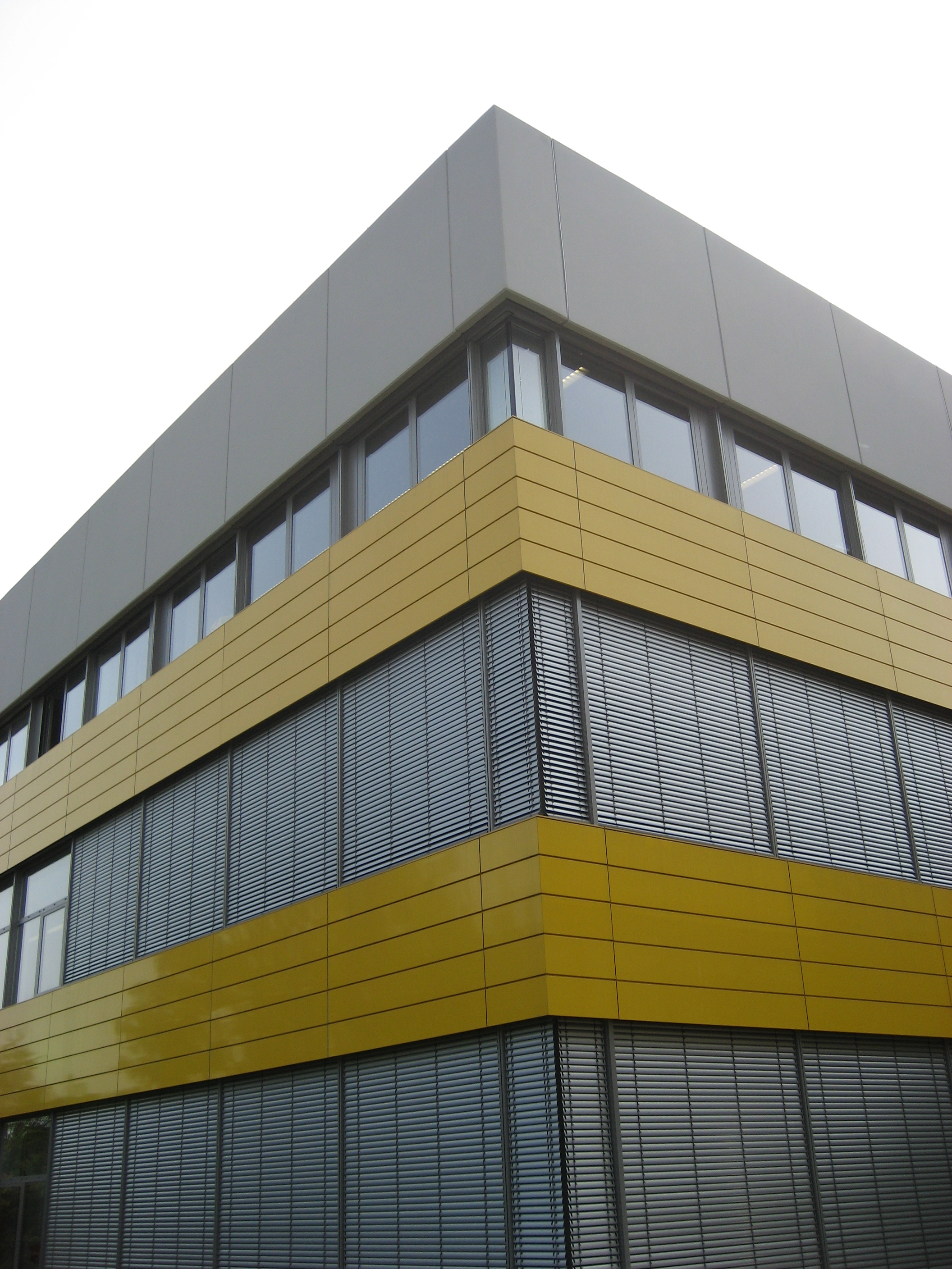 Außenansicht des Abtei-Gymnasiums Brauweiler